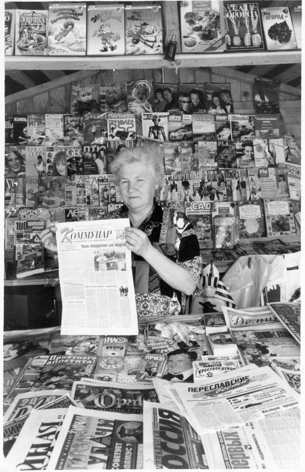 Продажа газет и журналов в городе Переславле на Славянском базаре. Продавец агитирует за подписку на газету «Коммунар».